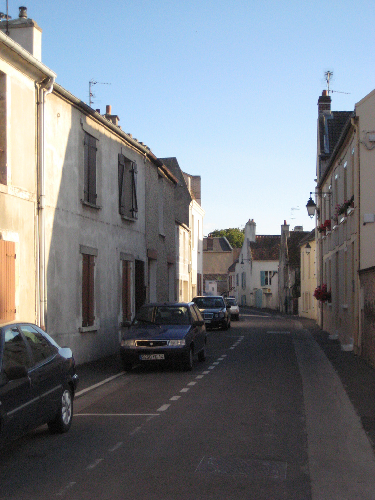 Rue de la République, ancienne rue principale du village de Colombelles (14).